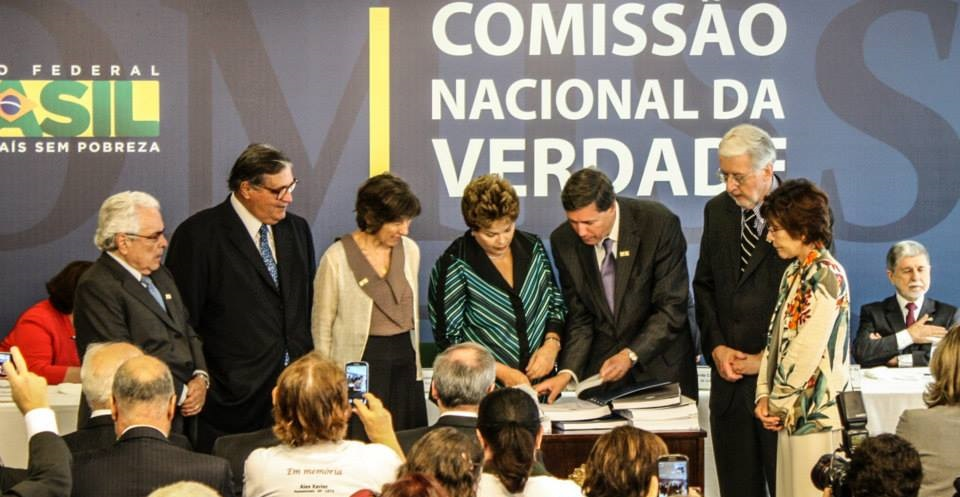 Os membros da Comissão Nacional da Verdade, José Carlos Dias, José Paulo Cavalcanti, Maria Rita Kehl, Pedro Dallari, Paulo Sérgio Pinheiro e Rosa Cardoso, entregam o Relatório da Comissão à Presidente Dilma Rousseff, em cerimônia realizada em 10 de dezembro de 2014, no Palácio do Planalto. Foto: Fabrício Faria|CNV